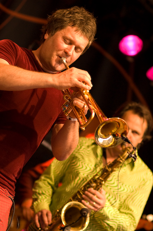 Eric Vloeimans (trumpet)